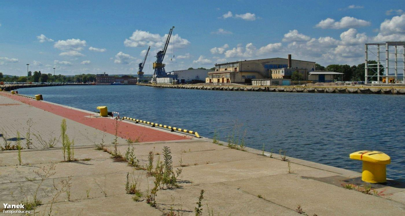 Basen im. Władysława IV gdańskiego portowego WOC-u. Na pierwszym planie Nabrzeże WOC II, po drugiej stronie WOC I, zaś na końcu basenu portowego, Nabrzeże Zachodnie z specjalną rampą wyładowczą do obsługi statków tzw. "samochodowców".